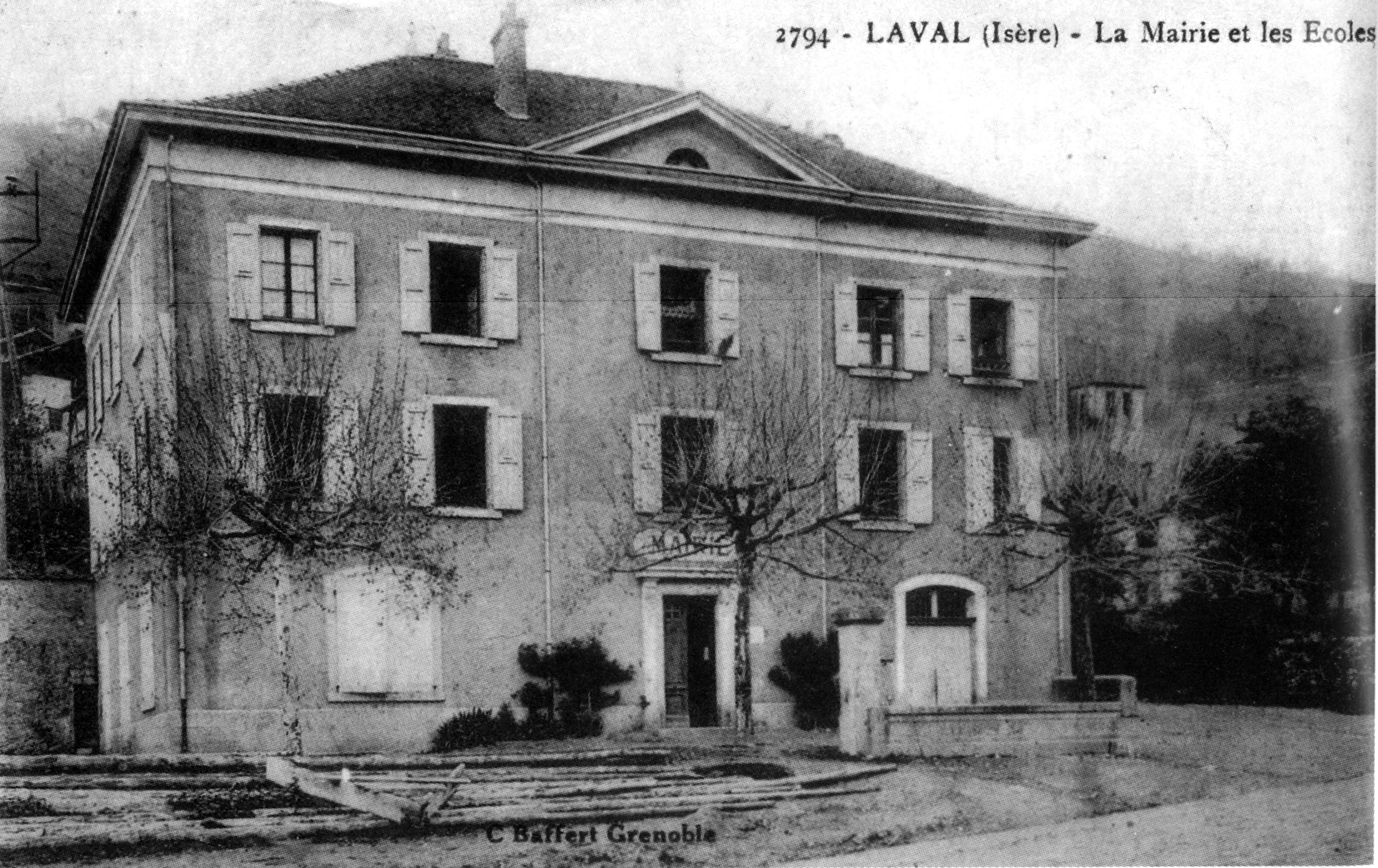 Laval, la mairie et les écoles en 1908